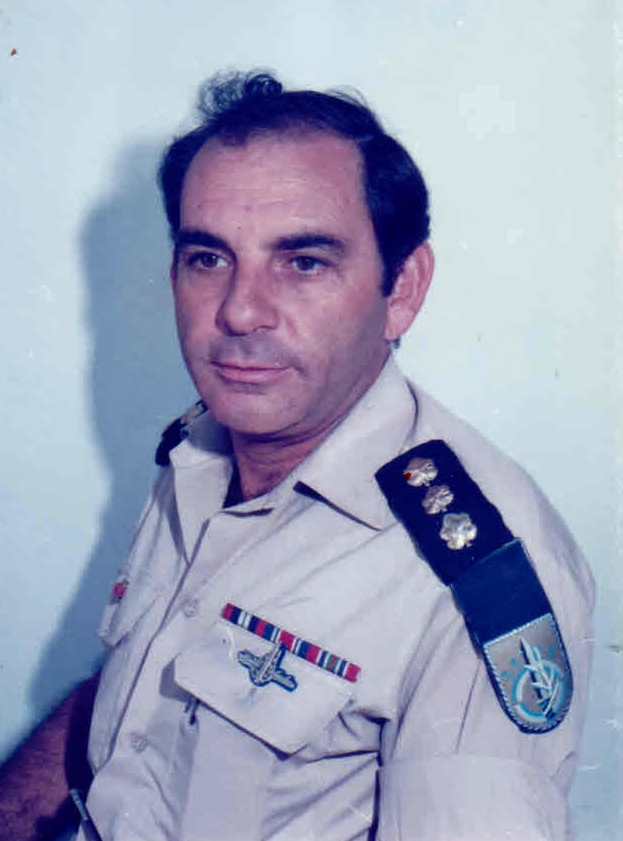 אל"מ יעקב אפיק 1985